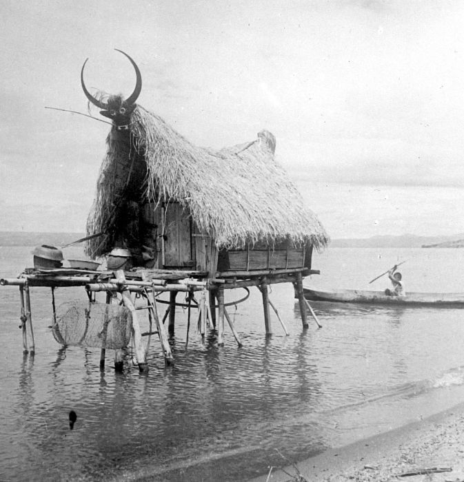 Repronegatief. Vissershuisje in het Toba-Meer bij Baligé